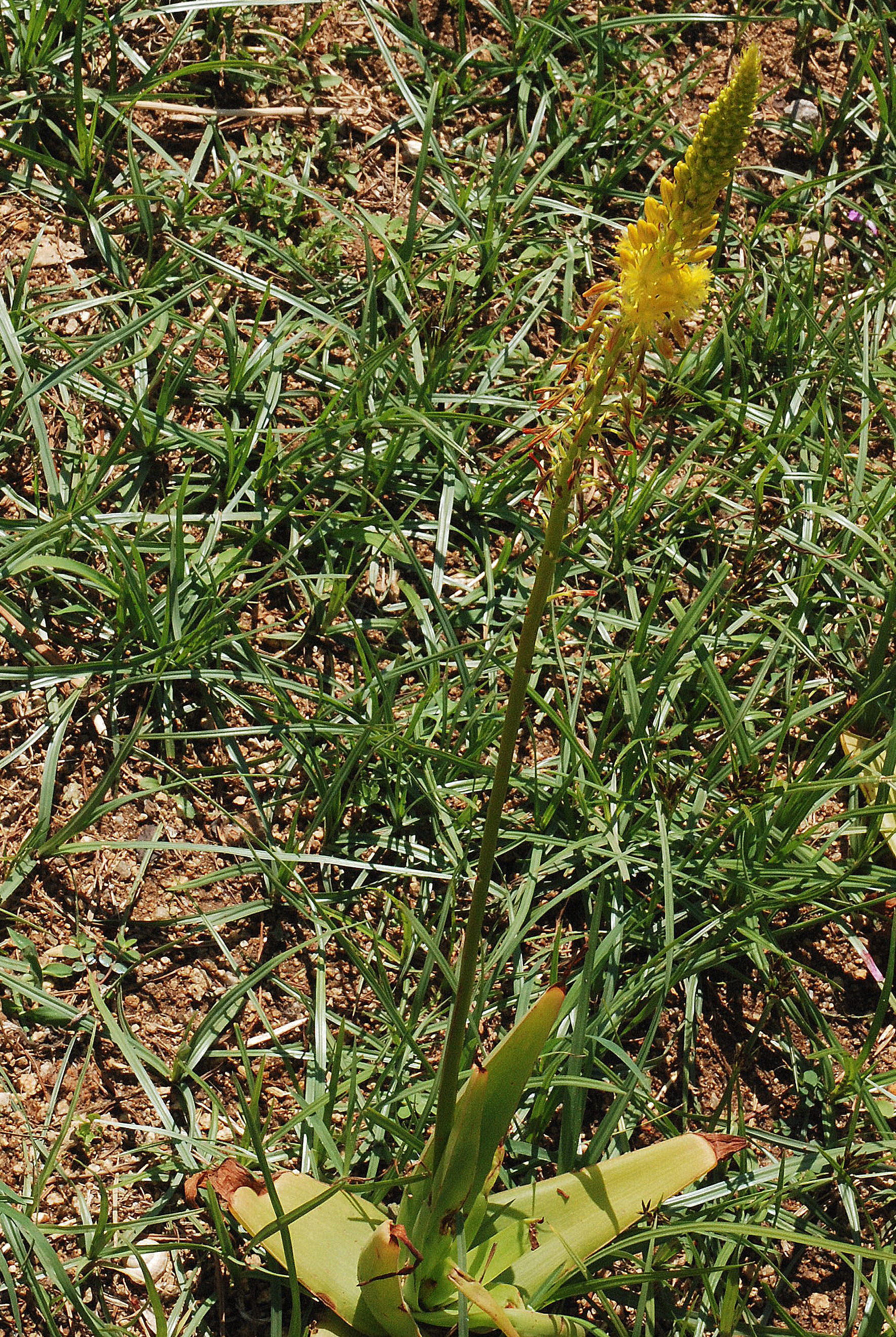 Bulbine latifolia in de botanische tuin van Barcelona